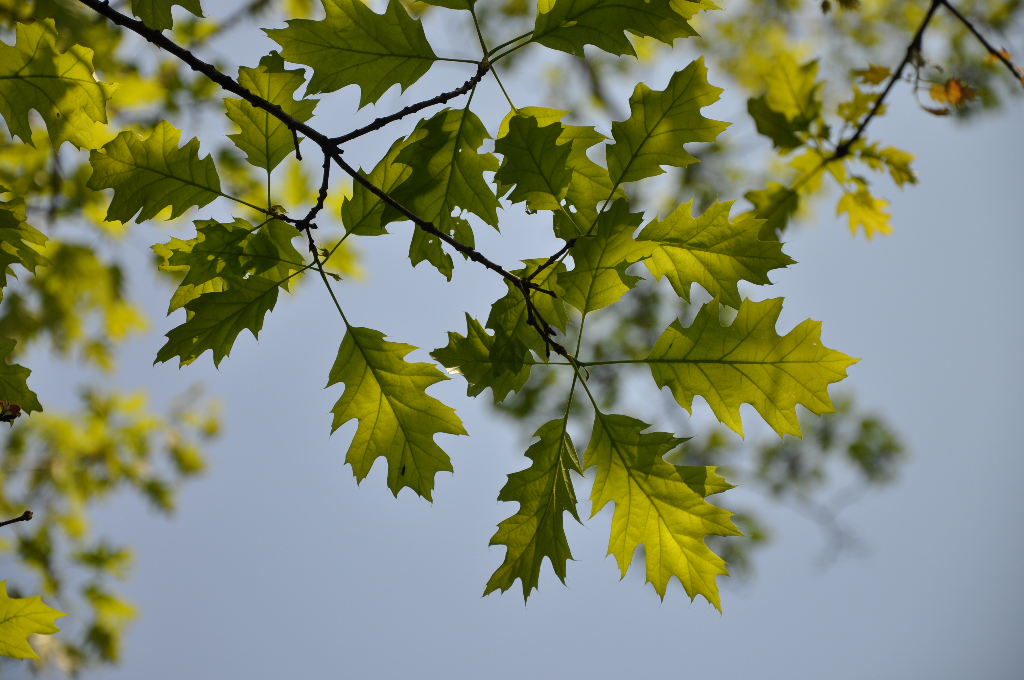 Quercus rubra